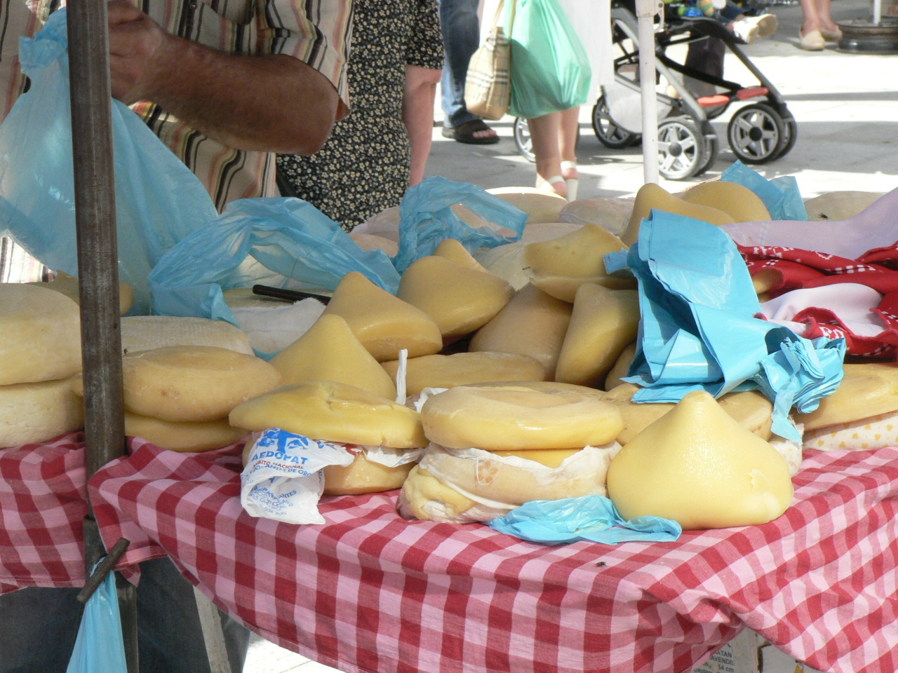 Betanzos un dia de feira